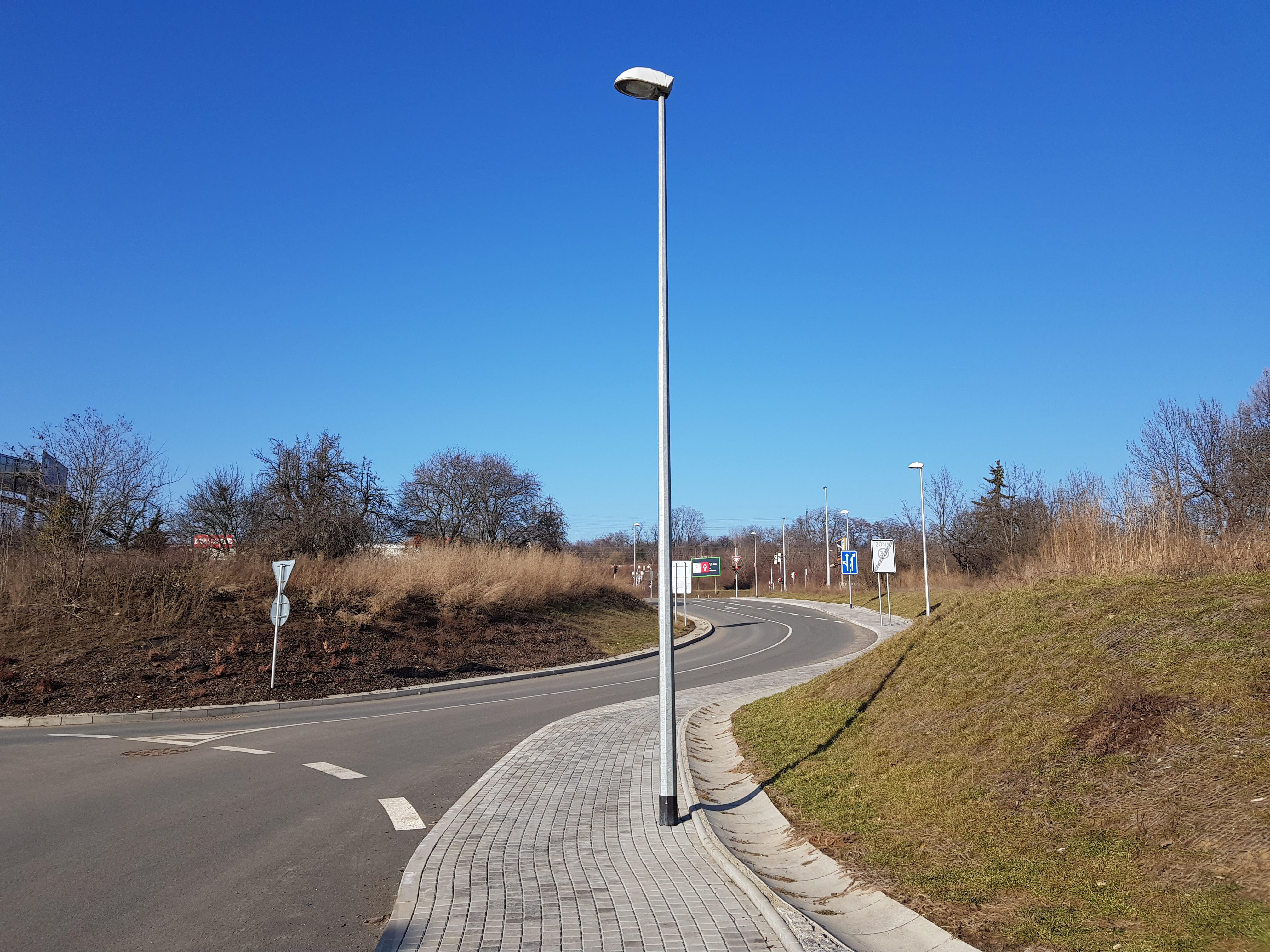 Ulice Laponská, Praha 9 - Hloubětín, pohled od kruhového objezdu severním směrem